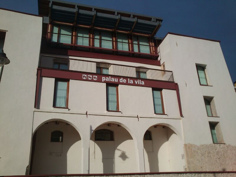 Faxada del Palau de la Duquessa d'Almodòvar o Palau de la Vila